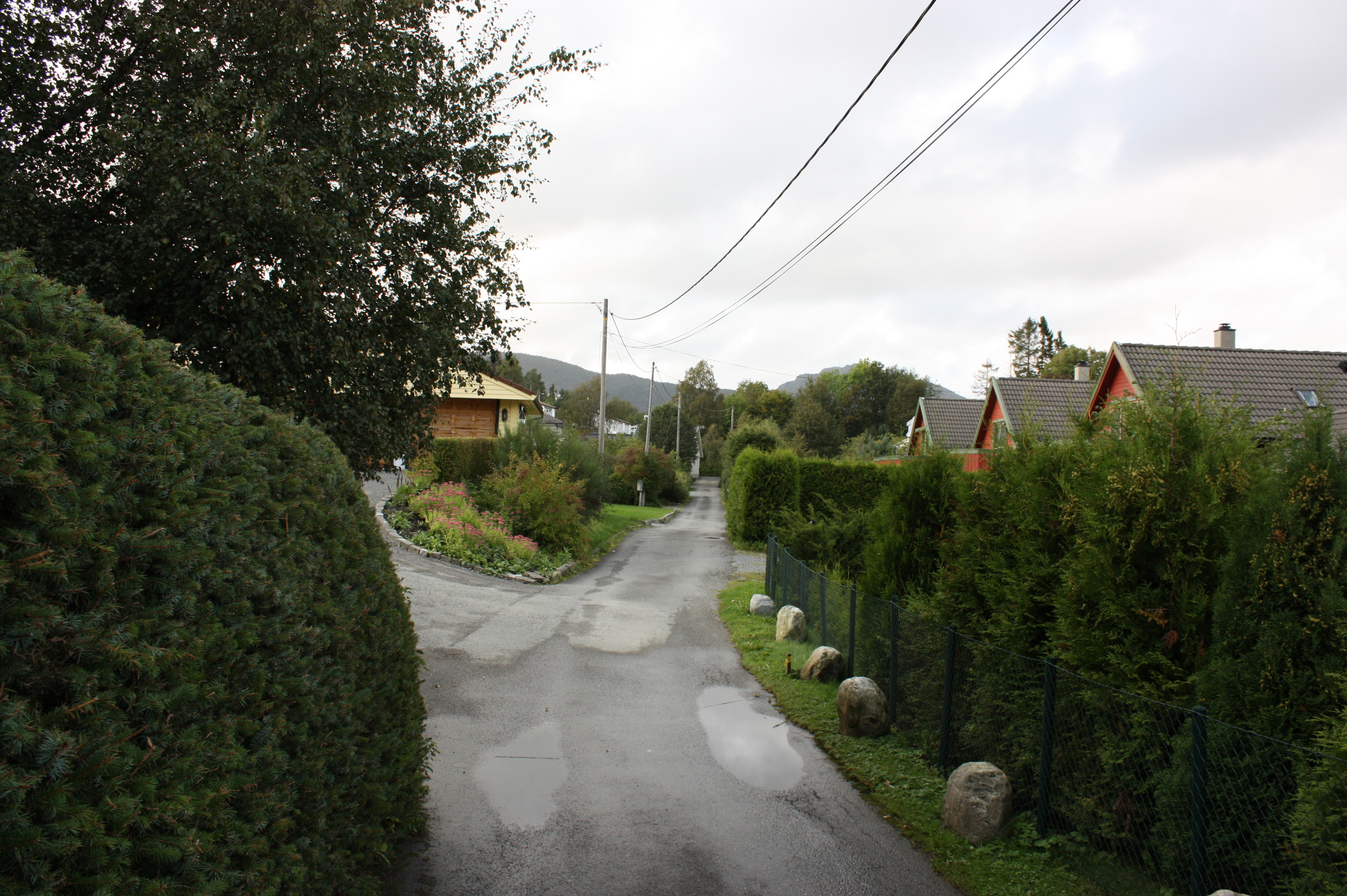 Hovdenflaten, Fana, Bergen.